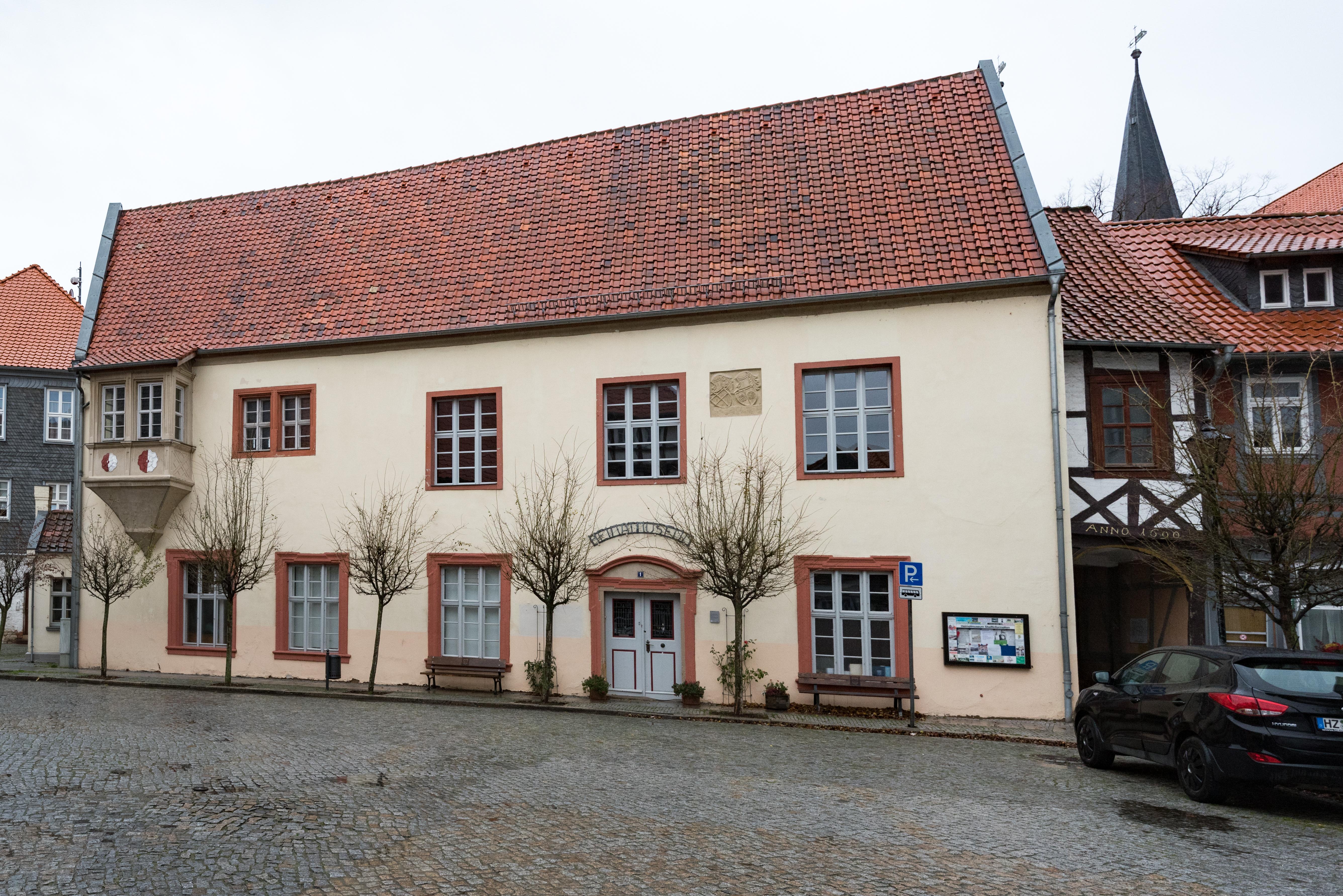 Osterwieck, Am Markt 1